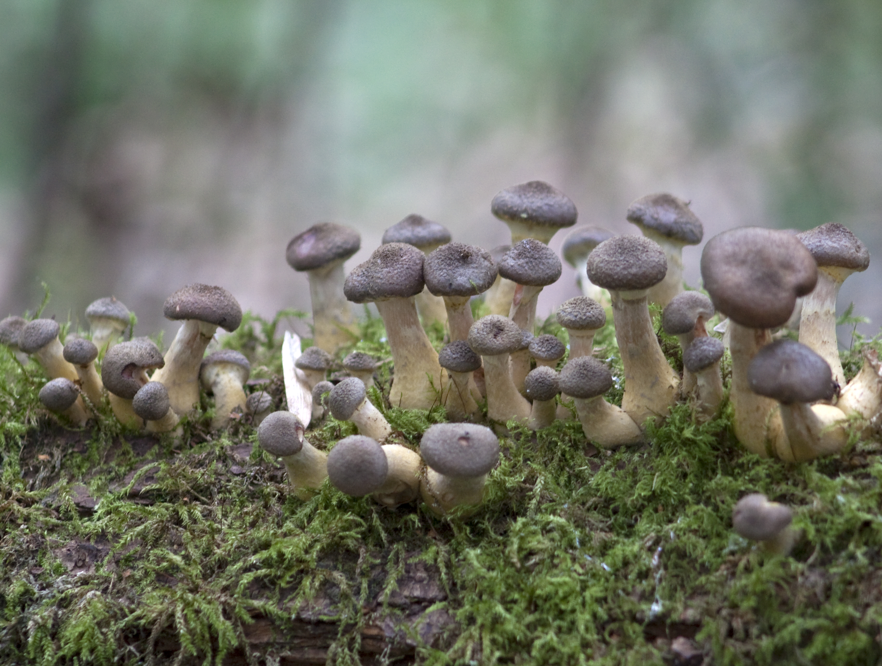 Fungi 1